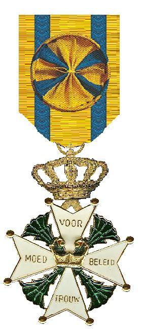 Scan van een kruis in mijn verzameling. Het lint is getekend. Robert Prummel